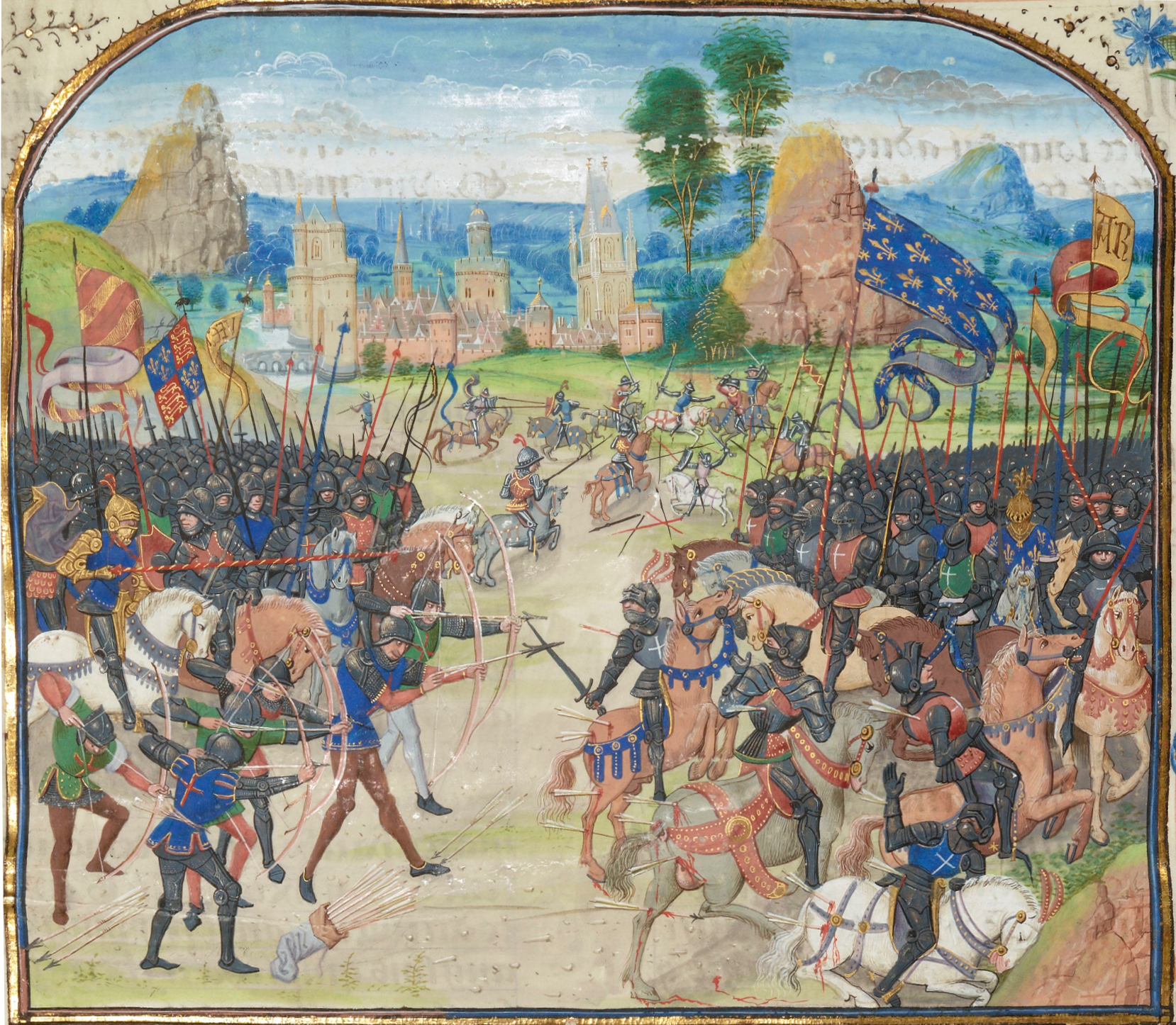 Batalla de Poitiers (miniatura de Froissart) : Miniatura medieval sobre esta batalla de la Guerra de los Cien Años ocurrida en 1356.